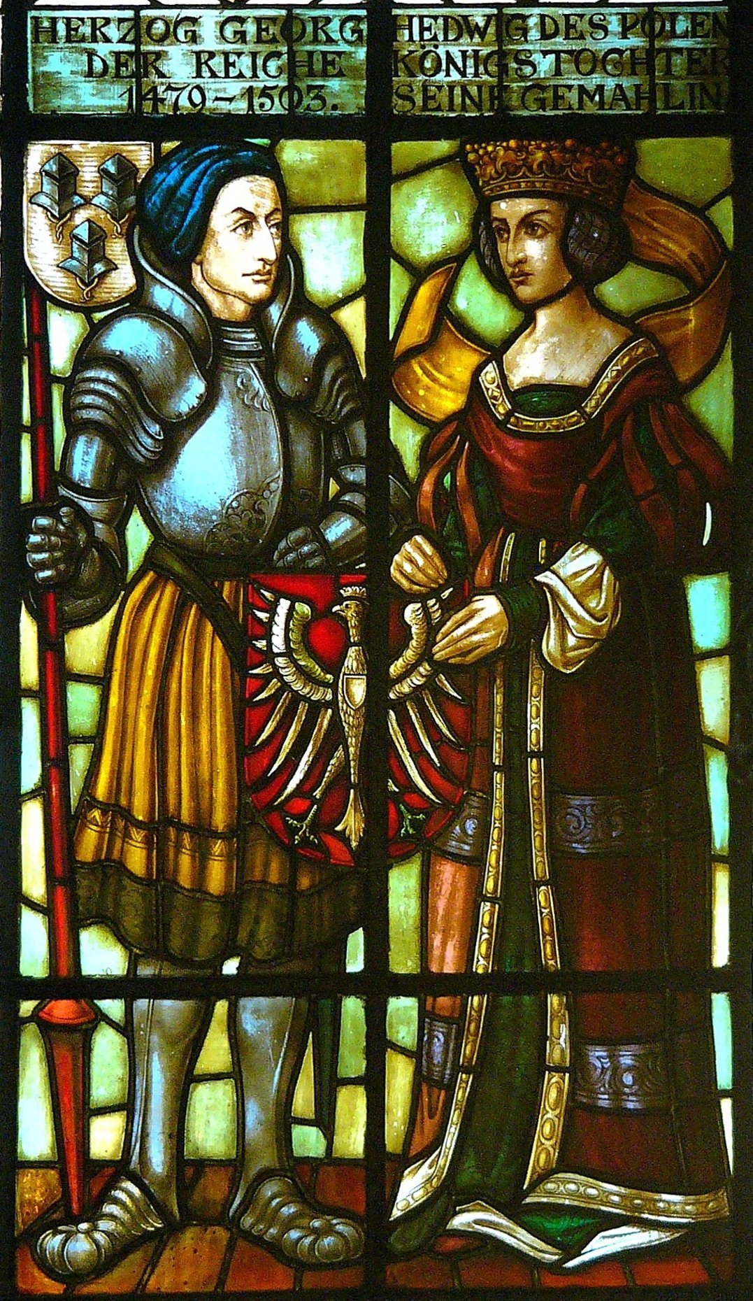 Landshut, Altstadt 315, Rathaus. Fenster in Haupttreppenhaus. Dargestellt sind Georg der Reiche und Hedwig von Polen. This is a photograph of an architectural monument.